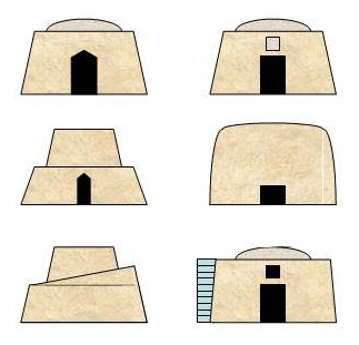 Giren